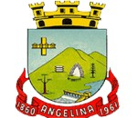 Blason de la municipalité d'Angelina - SC - Brésil